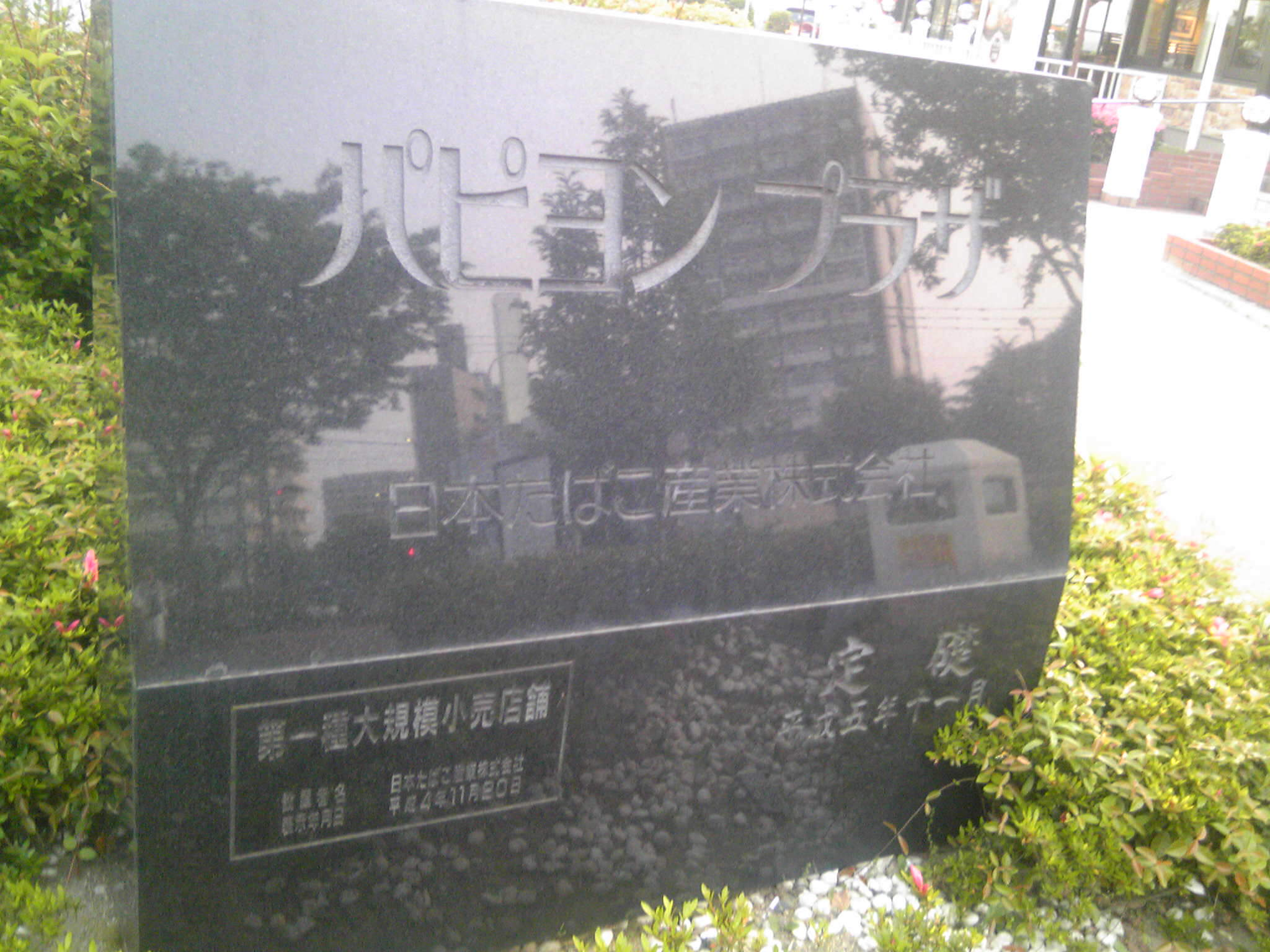 パピヨンプラザ入口の看板（福岡市博多区）